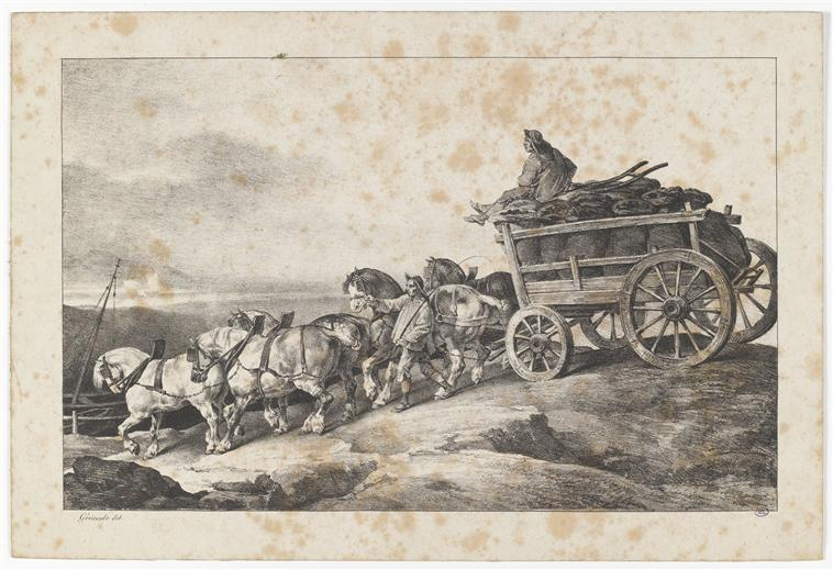 Chariot de roulage transportant du charbon.